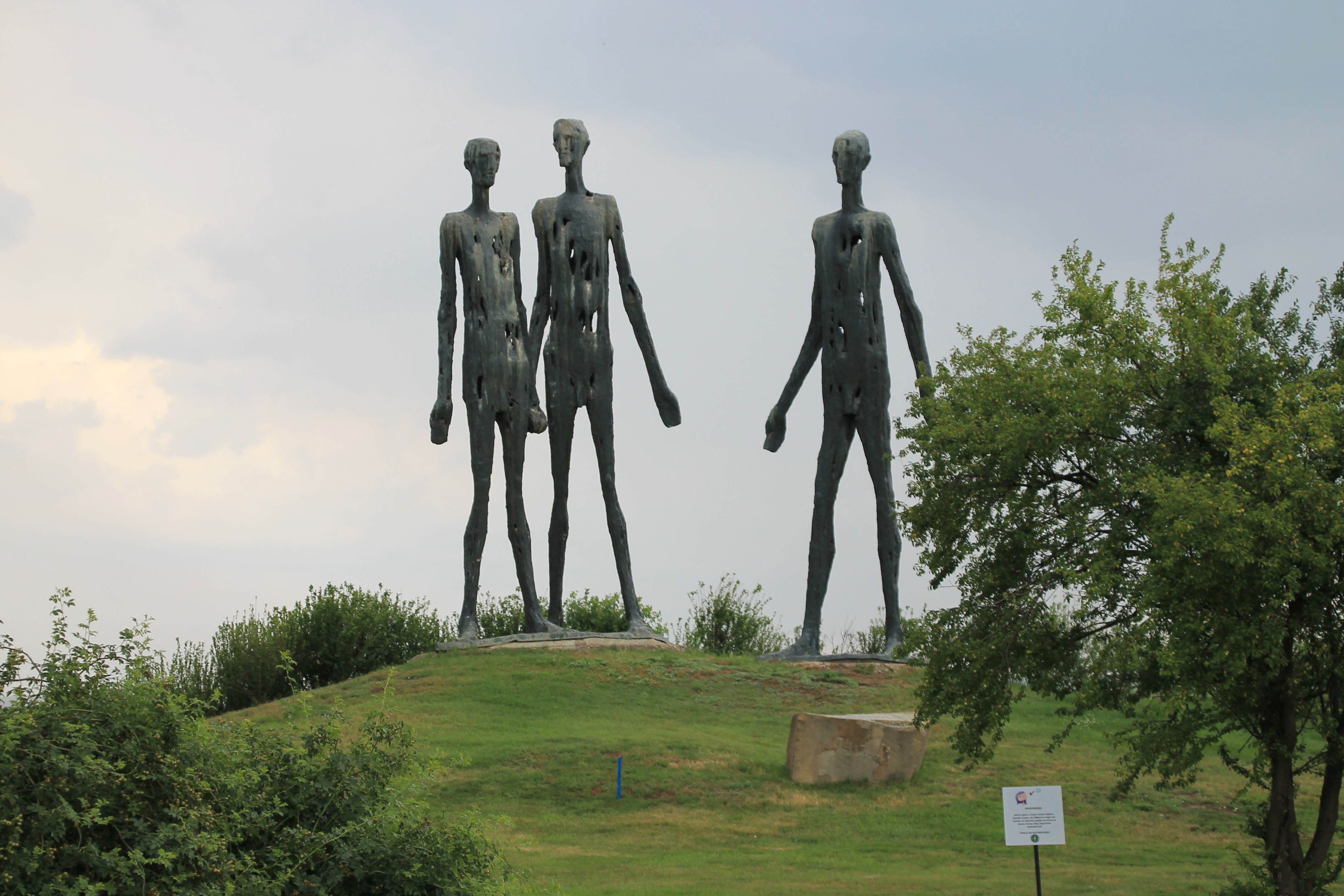 Spomen-kompleks Crna Ćuprija